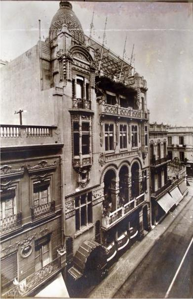 Club Español, en Buenos Aires. Edificio inaugurado en 1911 en la calle del Buen Orden (hoy Bernardo de Irigoyen) n° 172/78. Se puede ver su fachada original, que perdió mucha de su ornamentación durante su existencia.